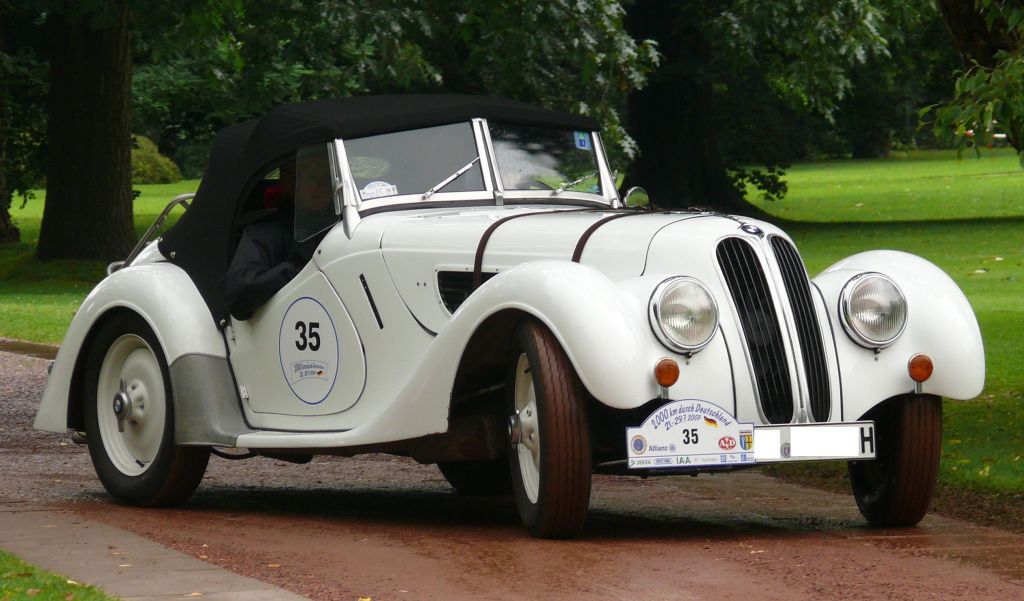 BMW 328 Roadster